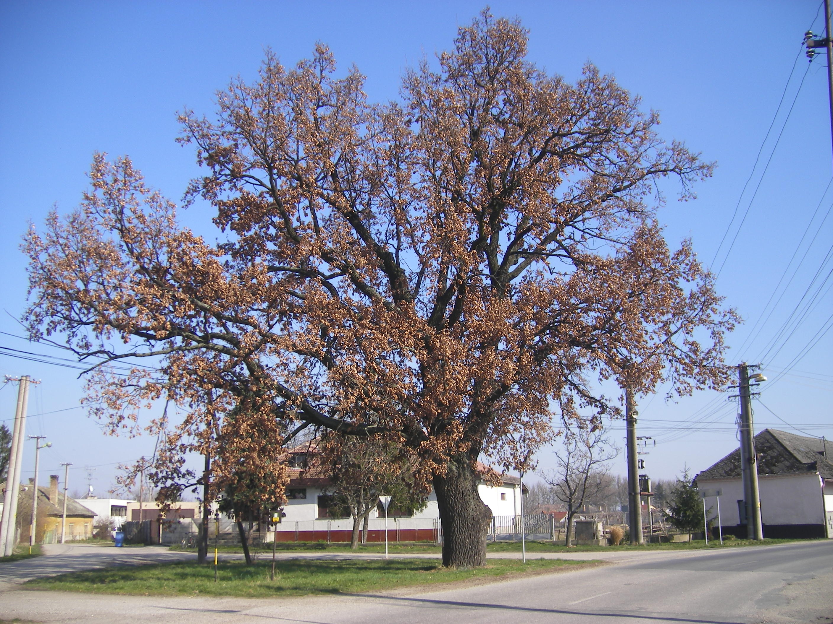 Nemesócsa, védett tölgyfa